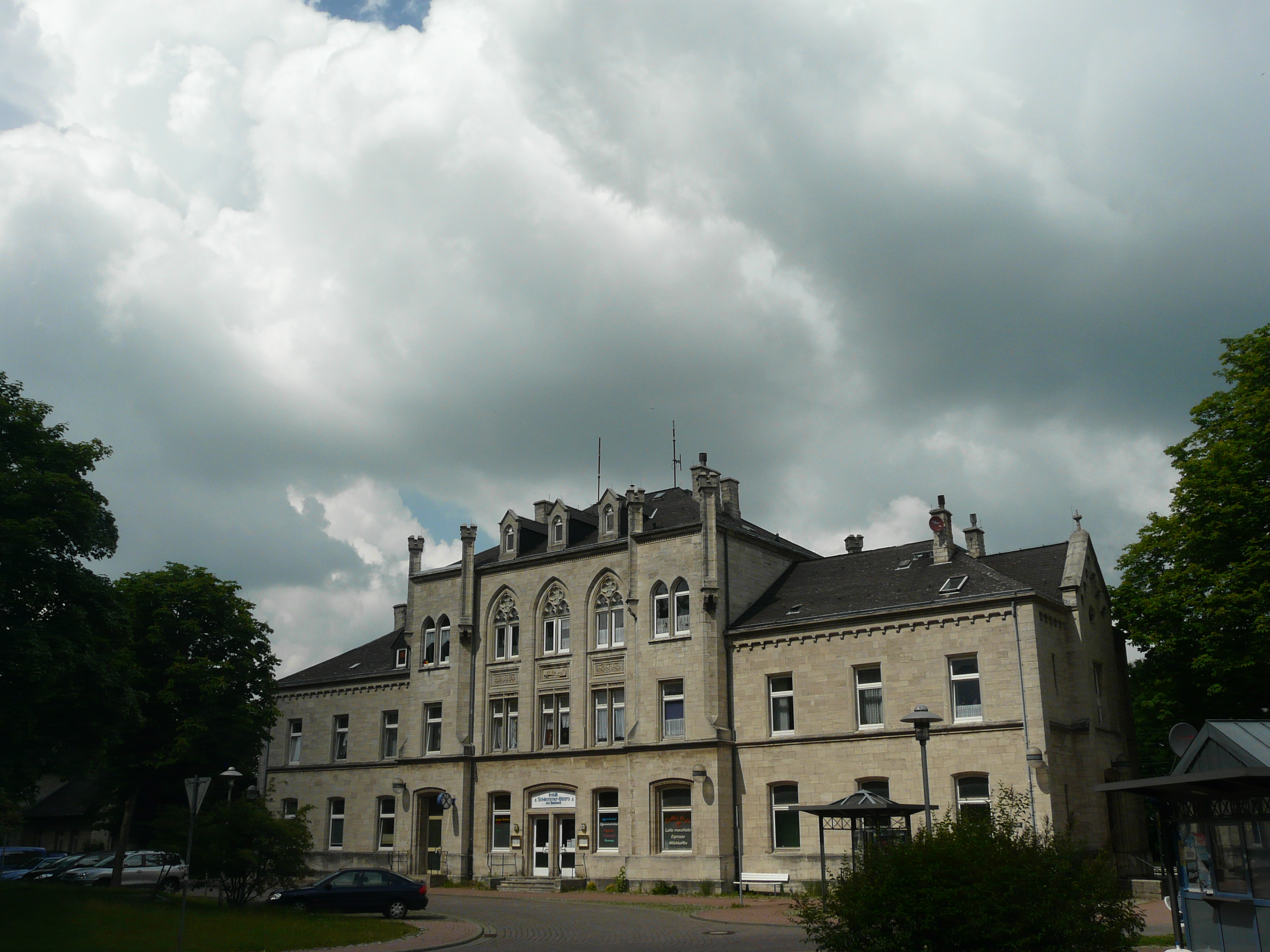 Der Bahnhof von Königslutter am Elm